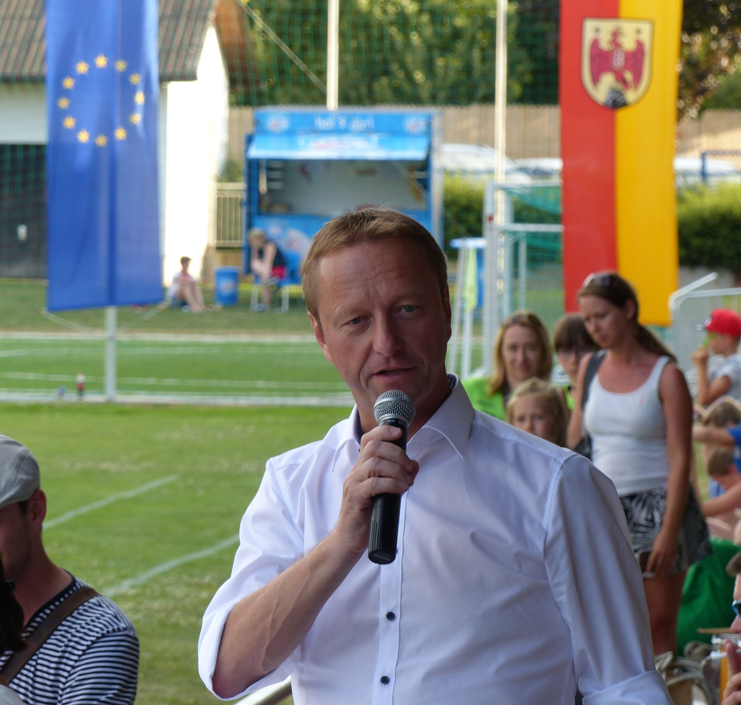 Landesfeuerwehrjugendleistungsbewerb 2016 Großpetersdorf